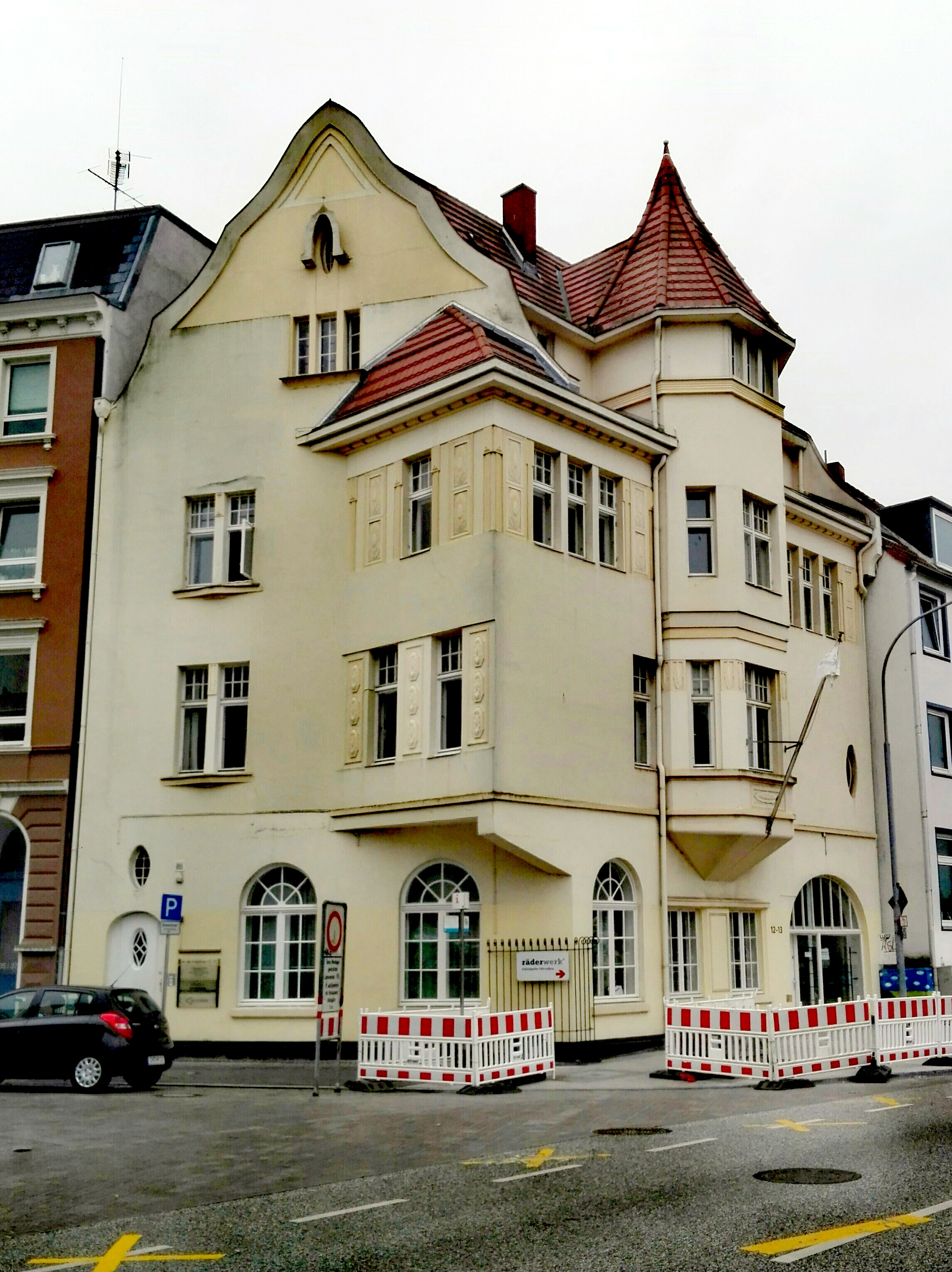 Ehemaliges Kontorhaus der C. F. Schütt & Co. in Lübeck. Später erweitert um die 13.